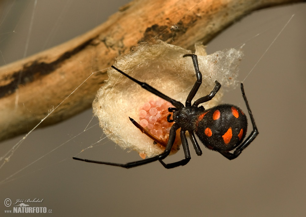 Омыртқасыздар